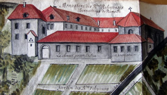 Vue cavalière du couvent des Bernardines de Rumilly au XVIIIe siècle